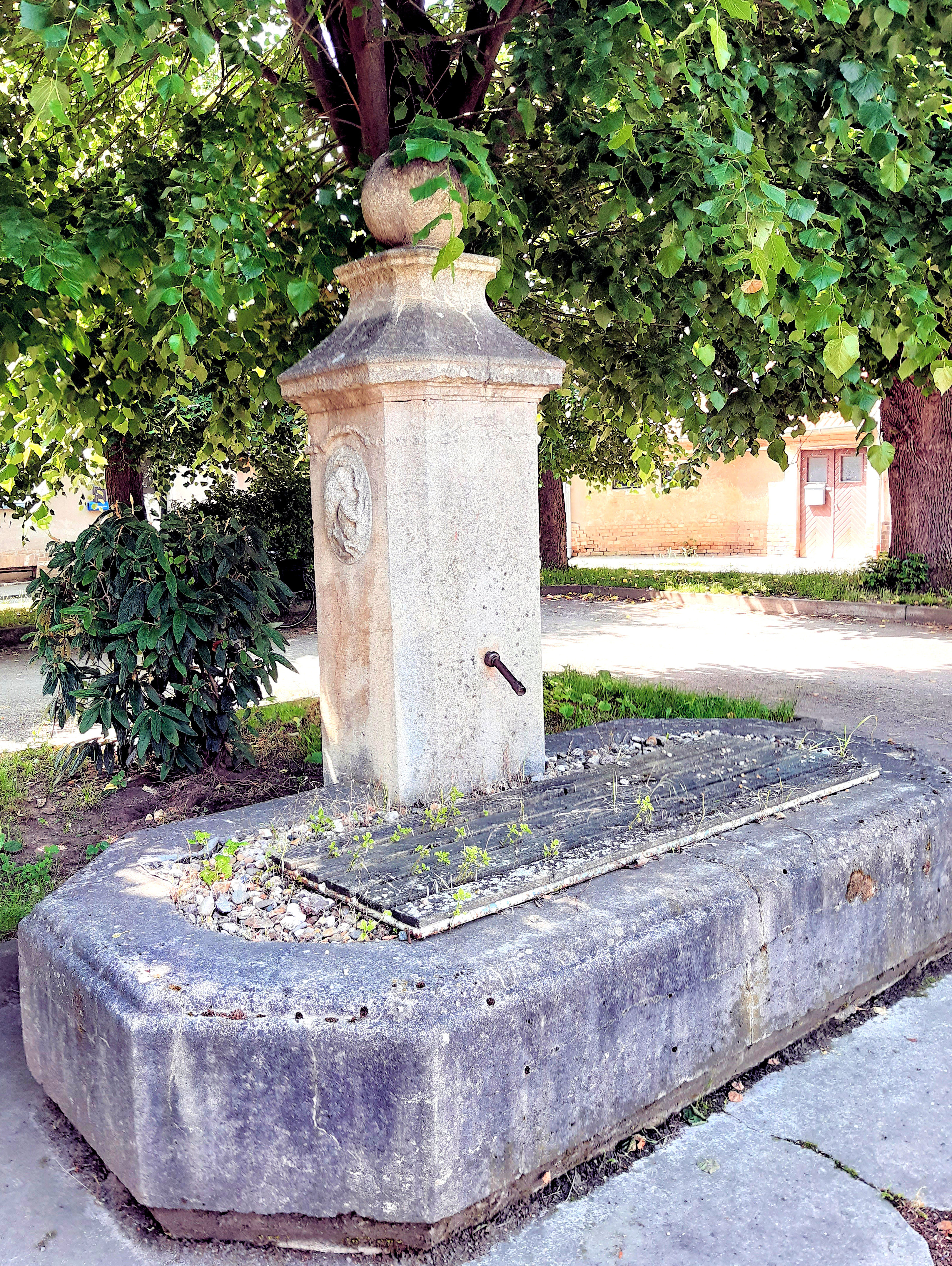 Brunnenanlage aus d. 1. Drittel des 20. Jh., Am Anger, Teutschenthal